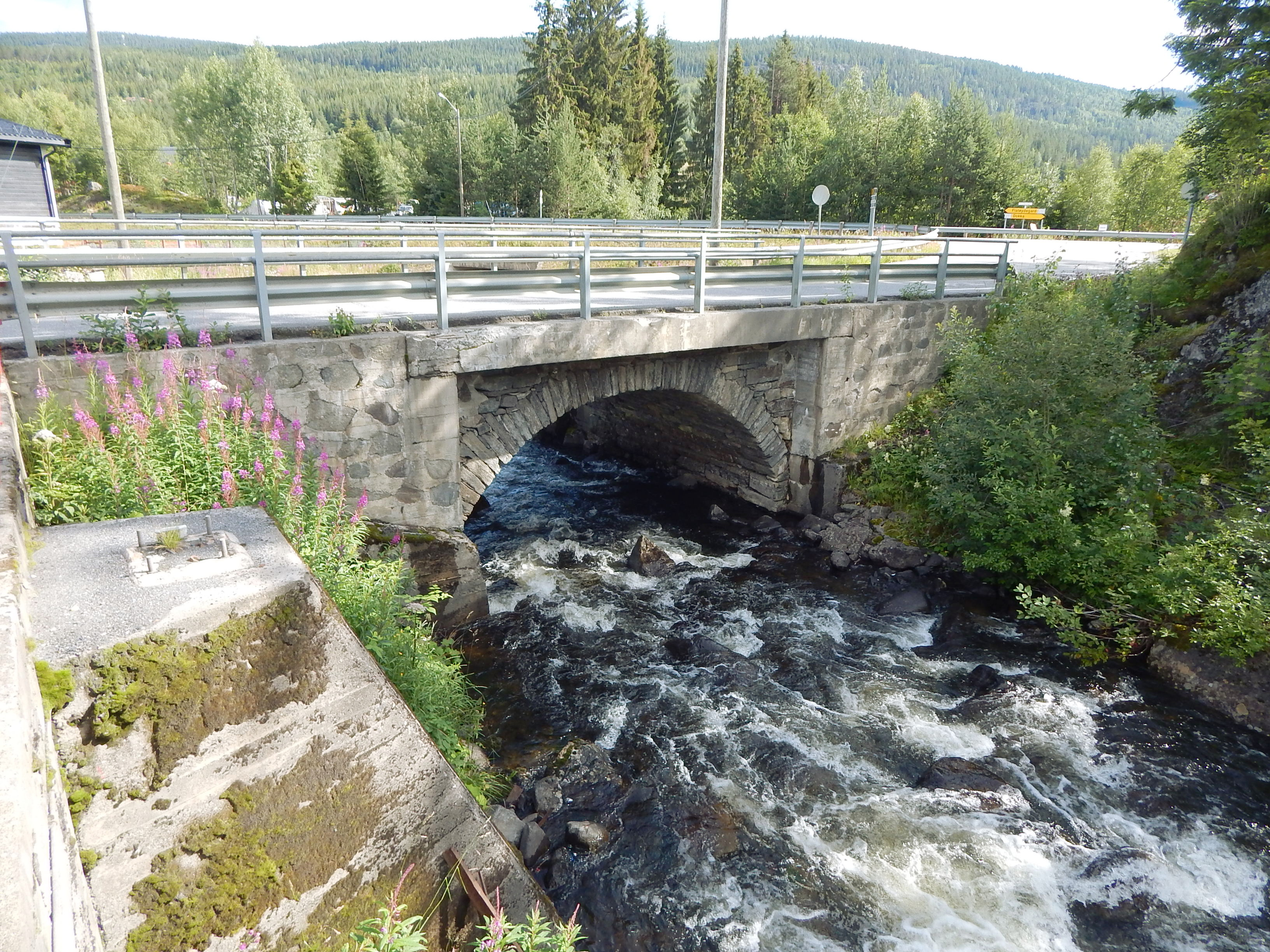 Kyrkjevegen krysser Fjellselve på Bruflat.